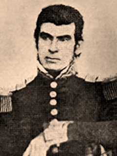 General José Cosme Urrea, o José de Urrea. Gobernador de Durango, Sonora y héroe de la guerra por Texas.